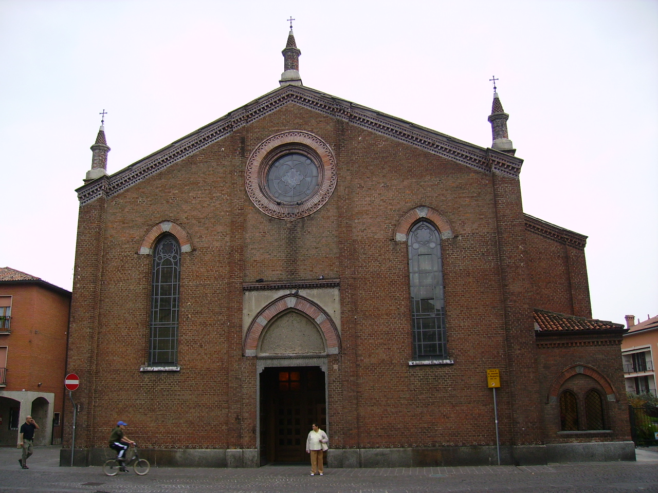 Melzo (MI), Chiesa dei Santi Alessandro e Margherita.